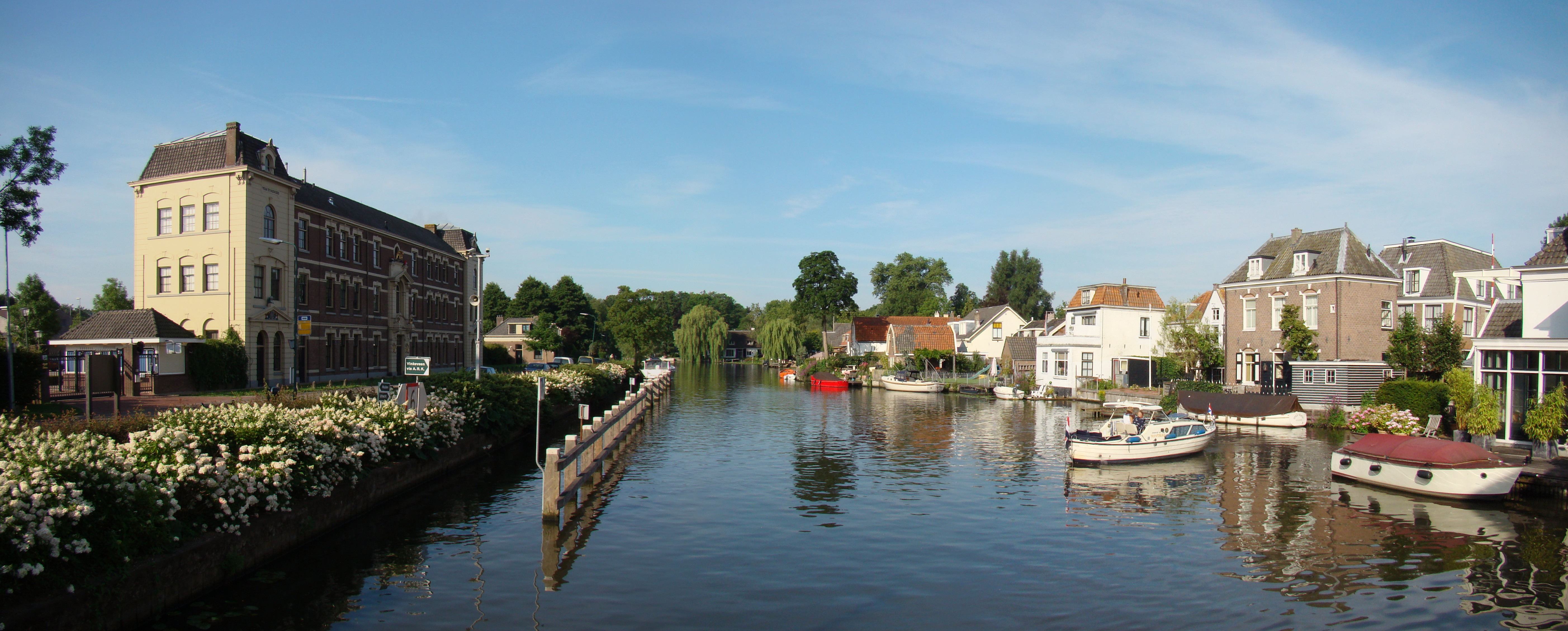 Rijksmonumenten in Nieuwersluis, Monumental buildings in Nieuwersluis, Netherlands